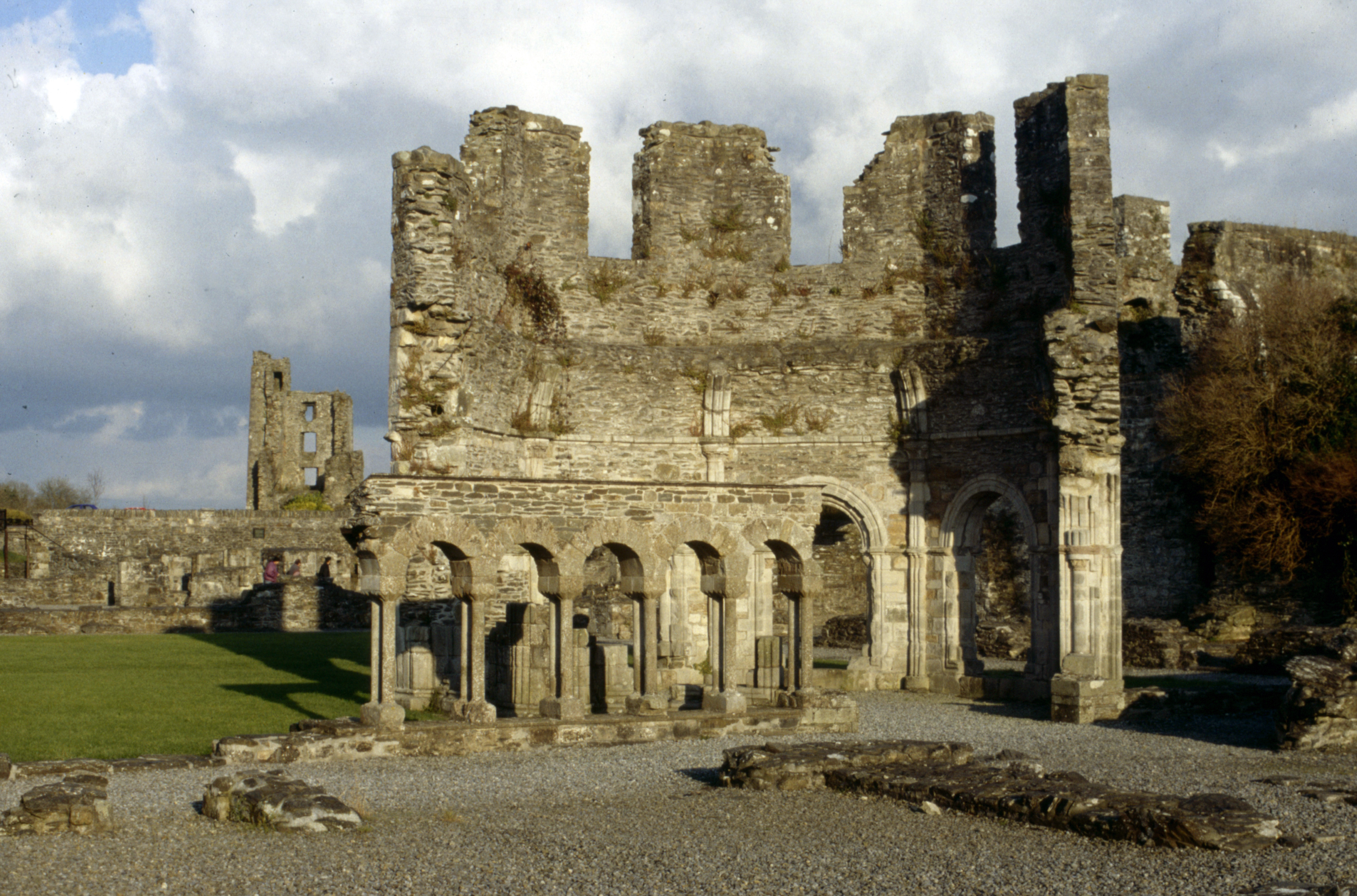 Mellifont Abbey